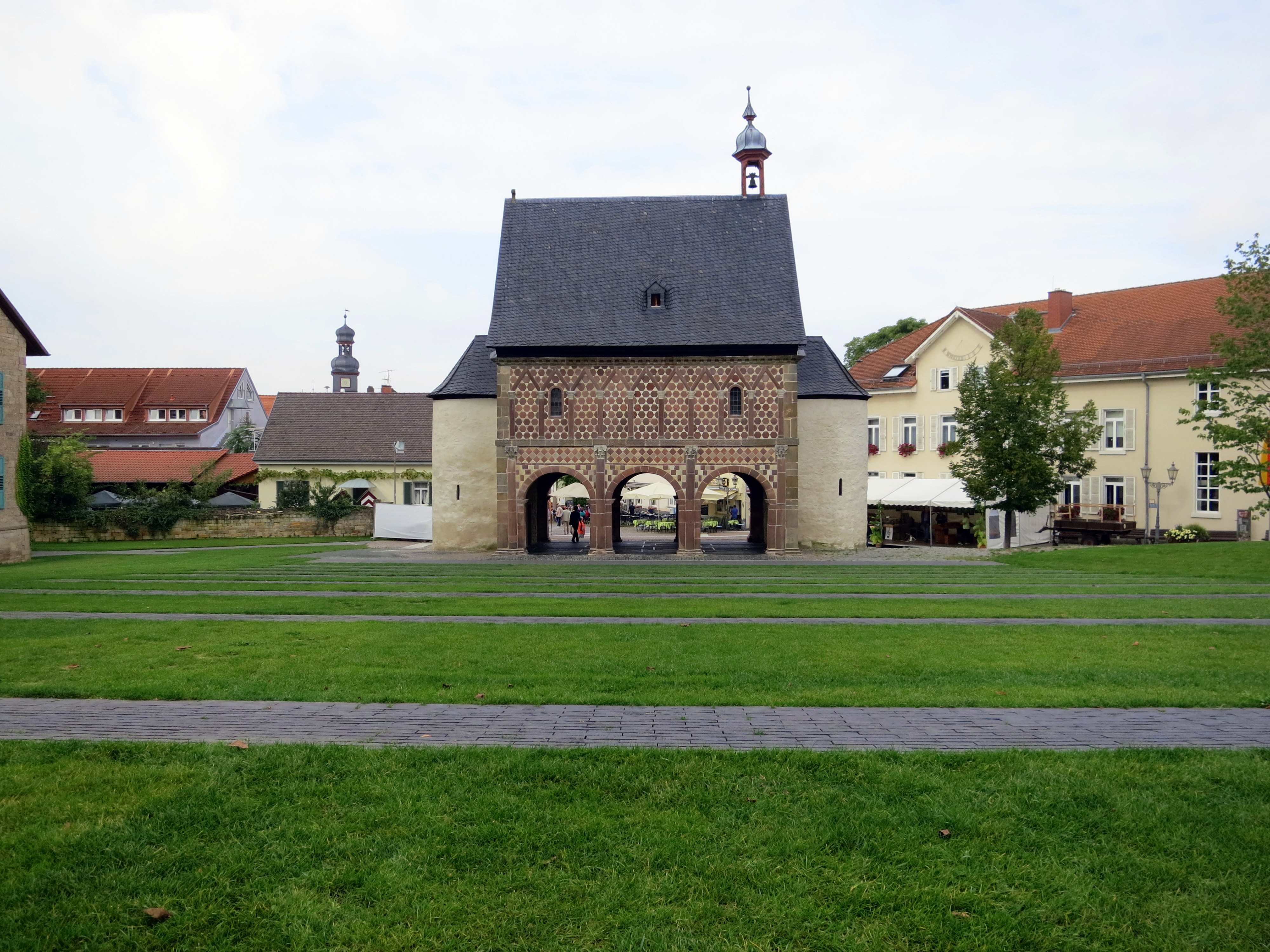 Blick auf das Kloster Lorsch vom Klosterbereich aus gesehen